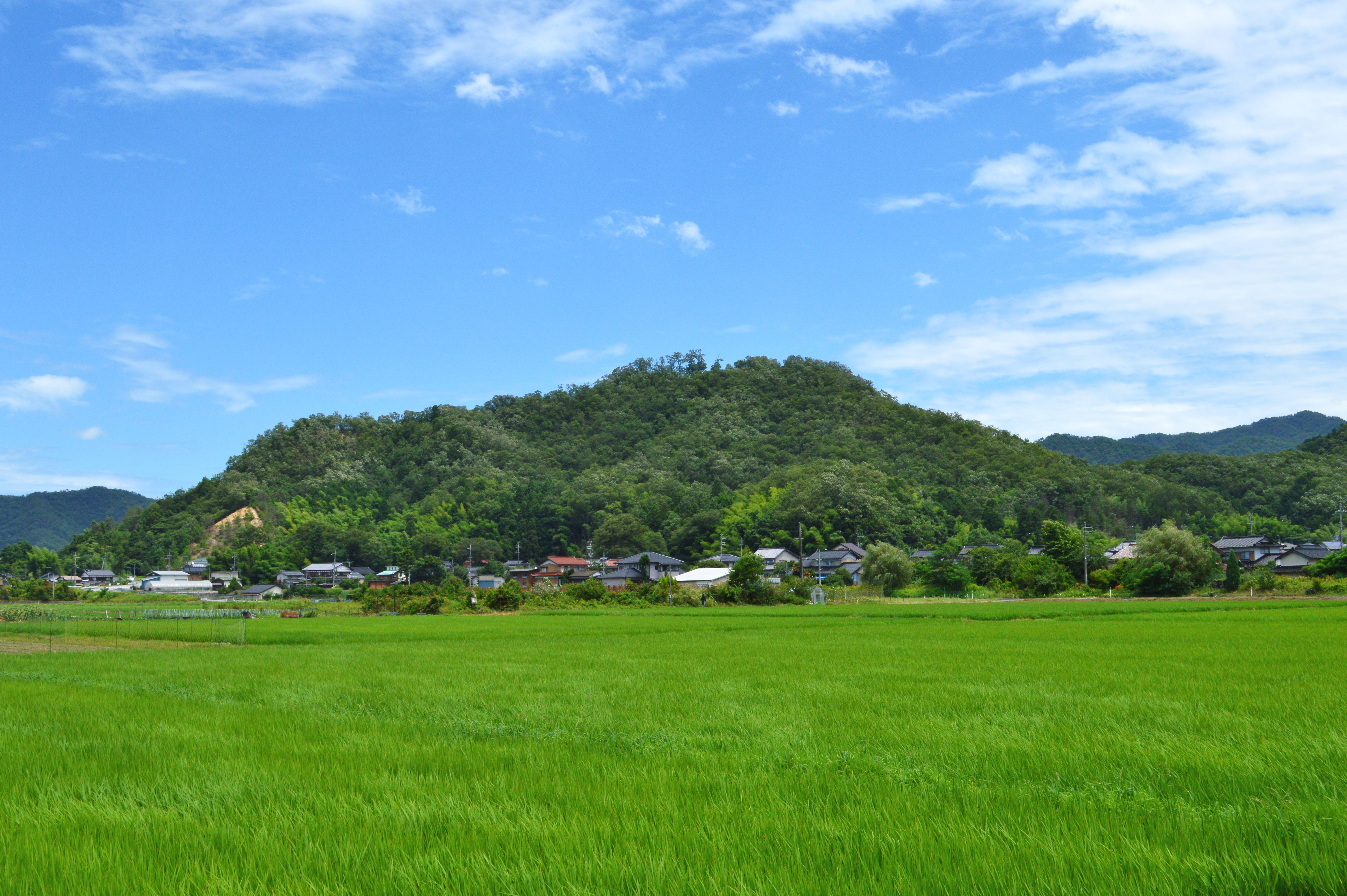 此隅山城 全景